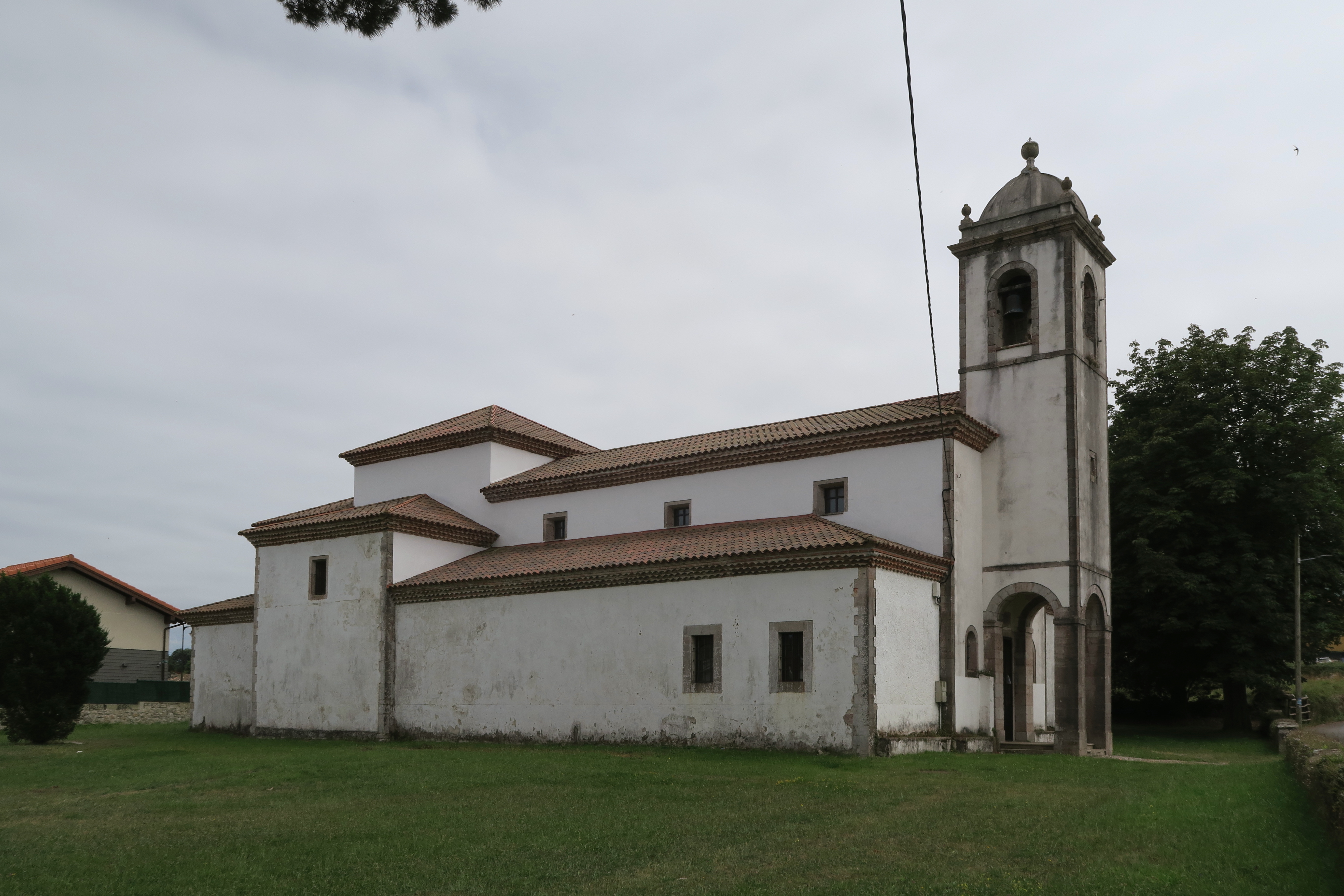 Iglesia de San Vicente, Poo (Llanes), 01